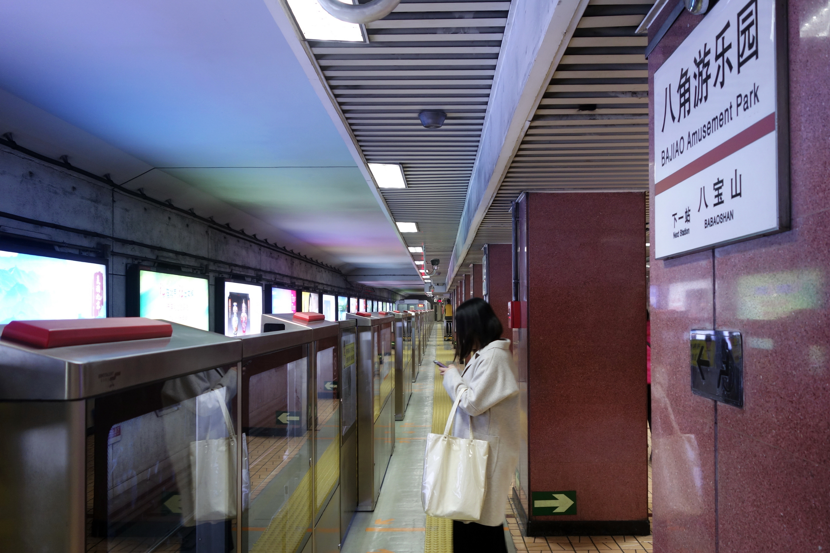 北京地铁1号线八角游乐园站侧式站台。站台加装半高式屏蔽门，2017年投入使用。